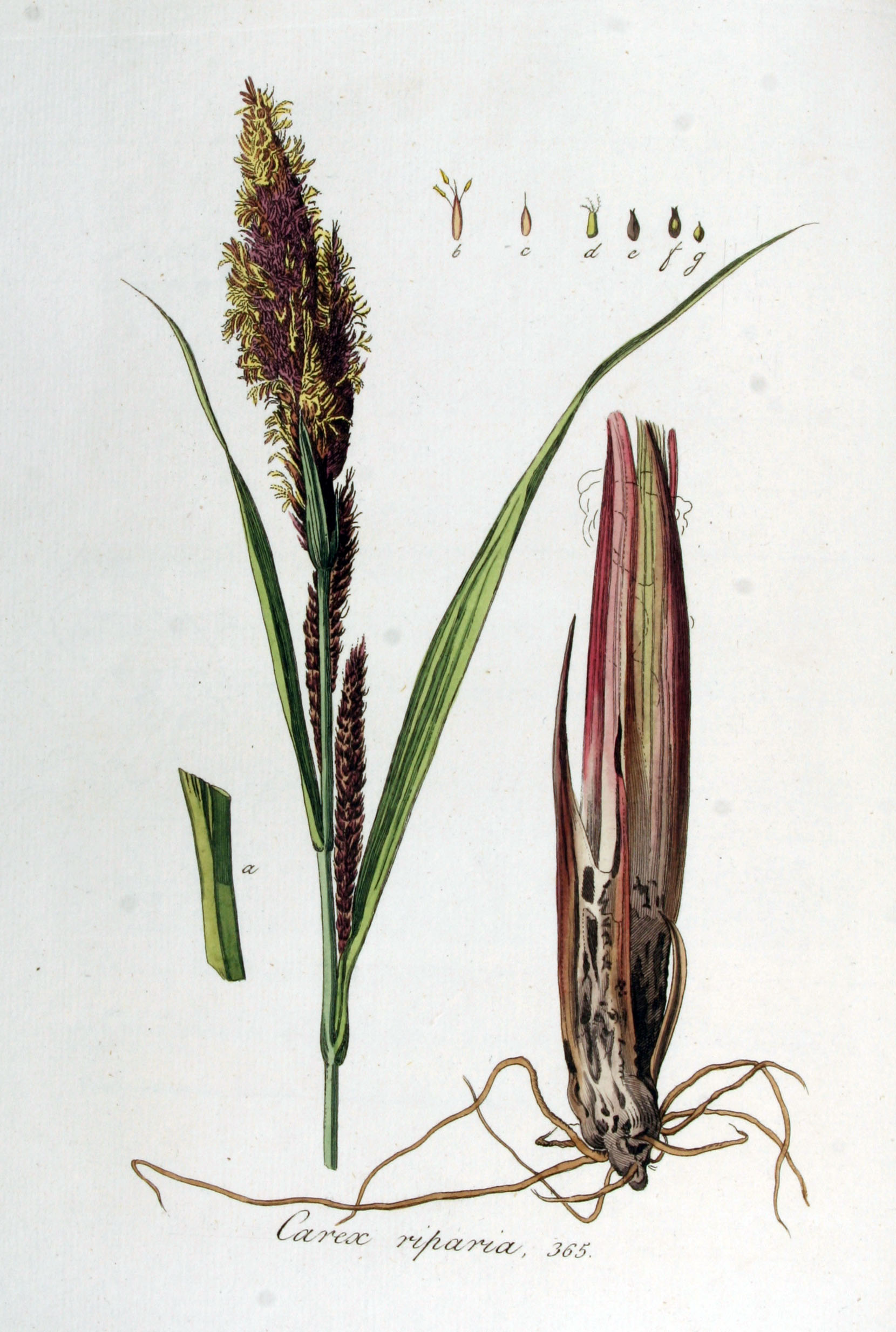 Carex riparia Huds.